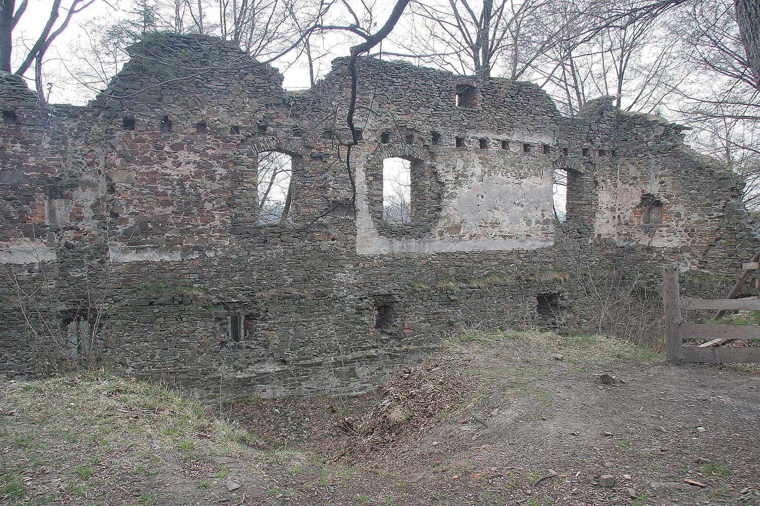 Hrad Vikštejn v okrese Opava - vnitřní nádvoří starého jádra